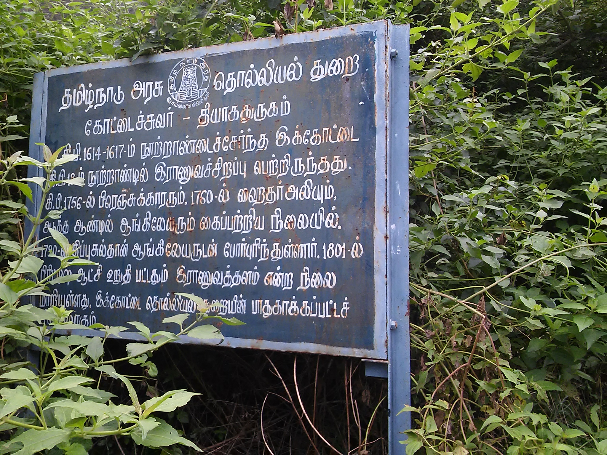 about fort description